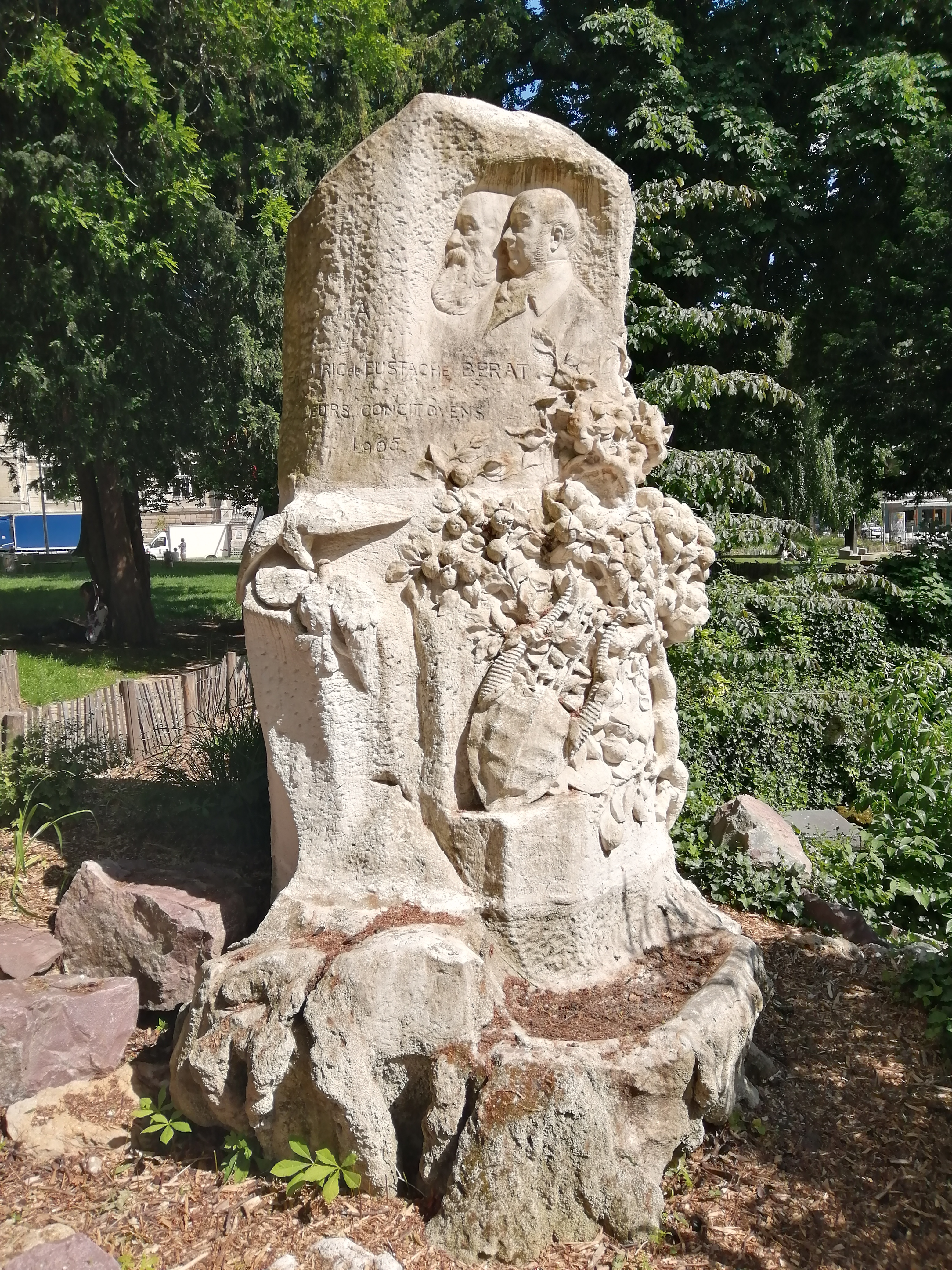 Frederic et Eustache Berat par Alphonse Guilloux, 1905. Square Verdrel à Rouen, ensemble du monument.